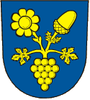 znak obce